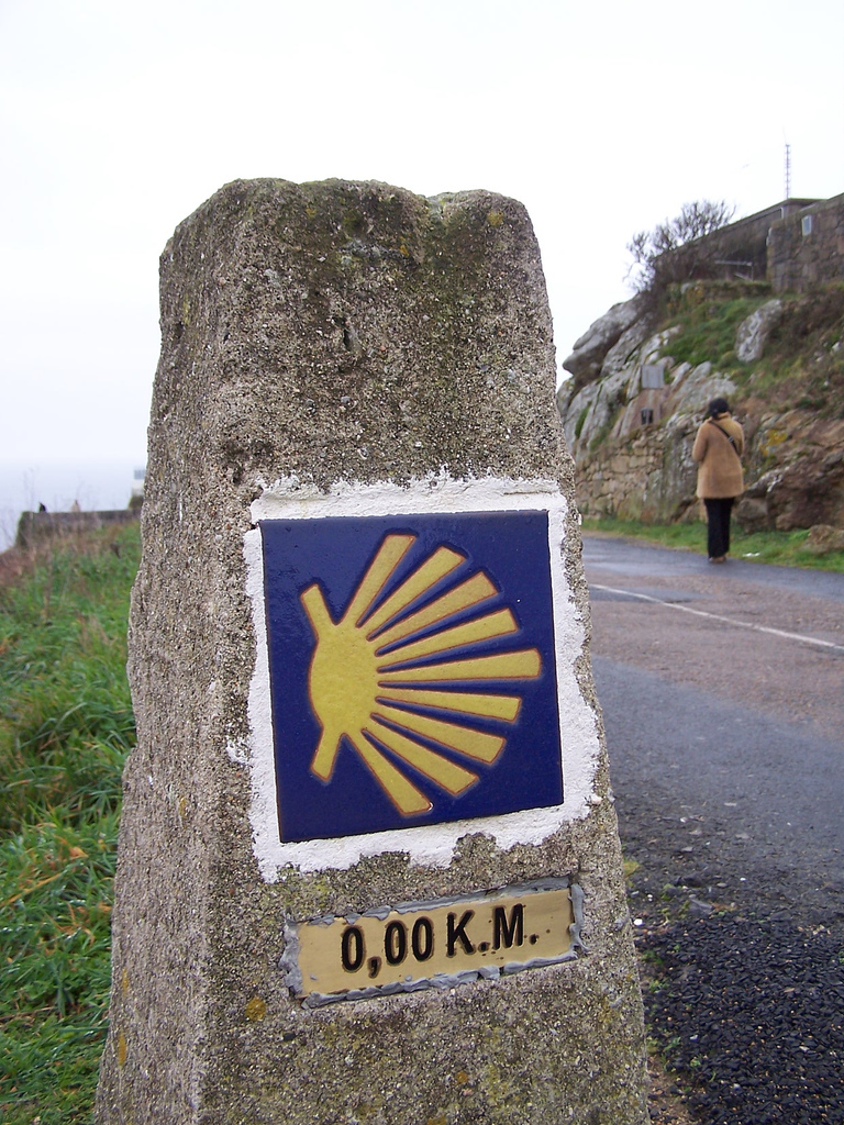 der Kilometerstein 0 am Ende der Straße nach Fisterra – ein Teil des Jakobsweges – von Santiago nach Fisterra (in Galizien), mit dem Sinnbild einer Jakobs- oder auch sogenannten Pilgermuschel – dem Schutzzeichen der Pilger